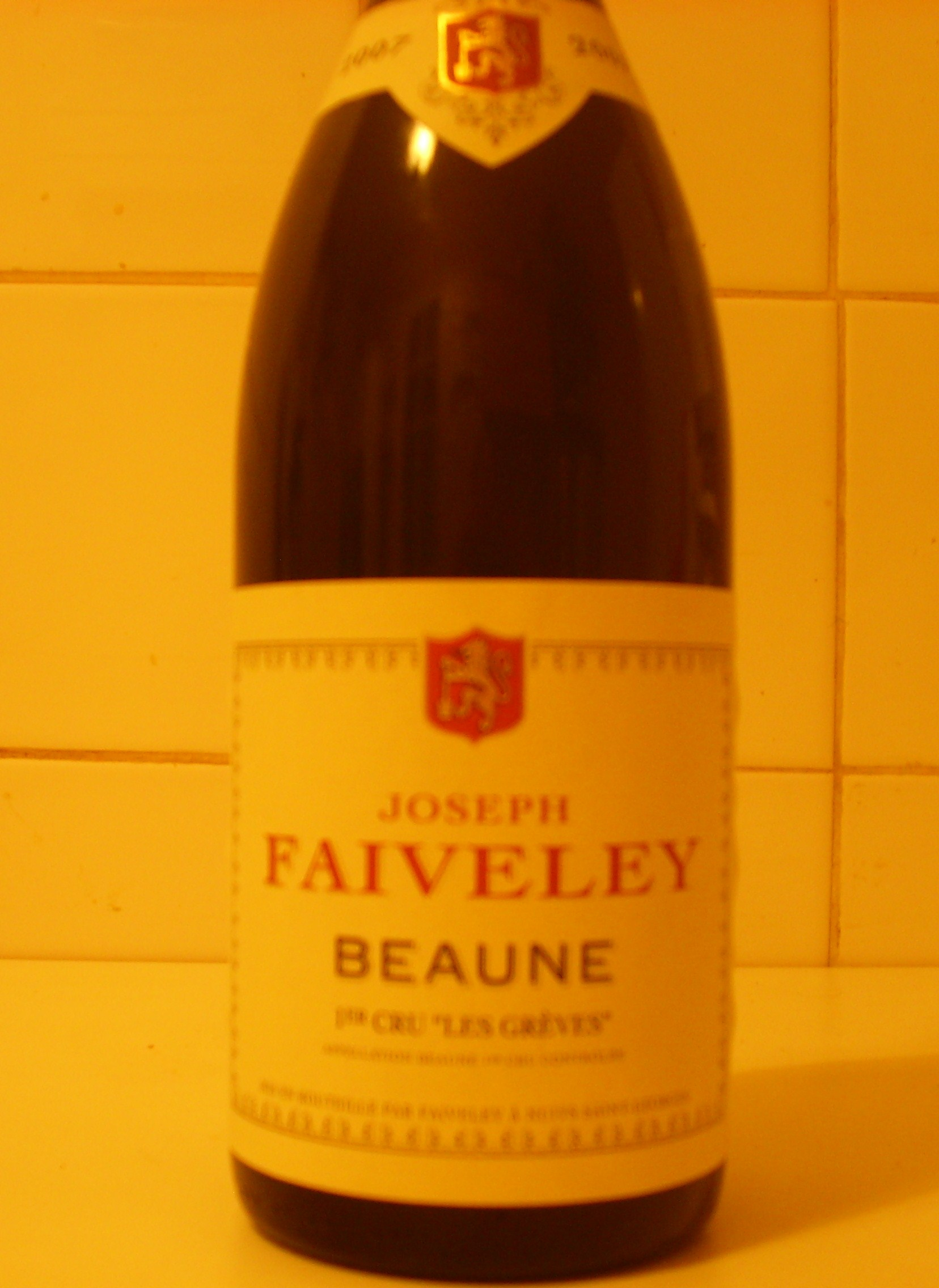 Bouteille de Beaune 1er Cru Les grèves 2007 (Faiveley)